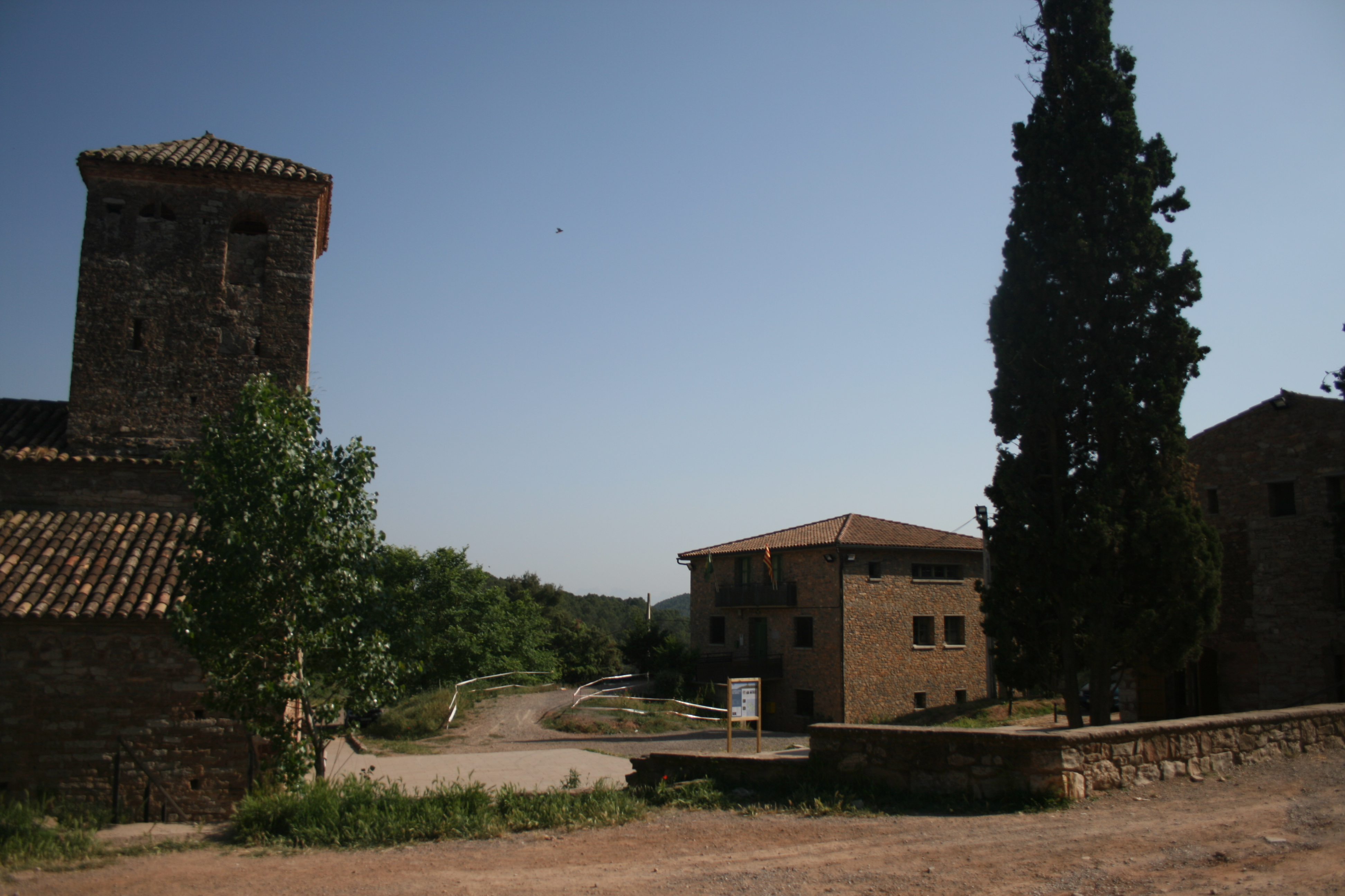 Ajuntament de Castellnou de Bages (de costat, l'església)